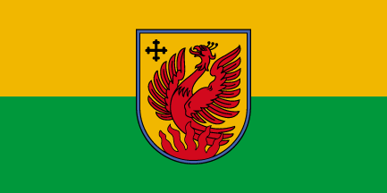 Dagdas novada karogs 2012. gada 22. jūlijs: Dagdas Vissvētās Trīsvienības Romas katoļu baznīcā Sv.Mises laikā tika iesvētīts Dagdas novada karogs, kas pēc tam tika svinīgi pacelts mastā pie novada domes.